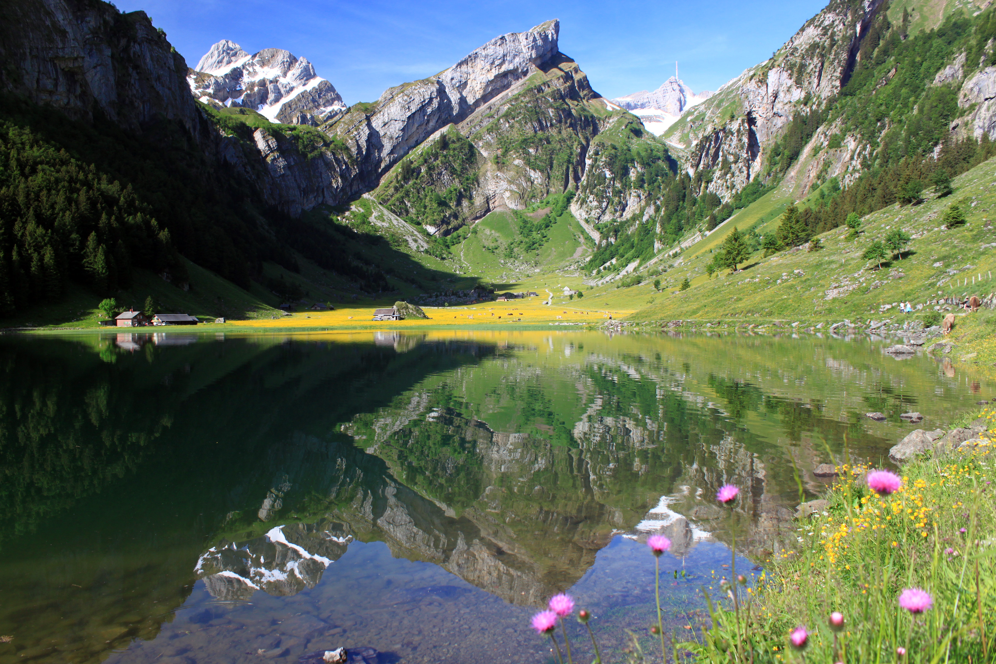 Der Seealpsee unterhalb des Säntis (Alpsteinregion) in der Schweiz